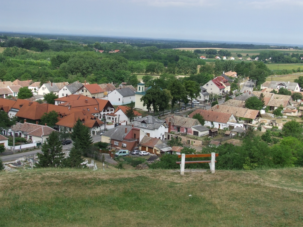 Döbrönte látképe a várból (Veszprém megye, Magyarország)